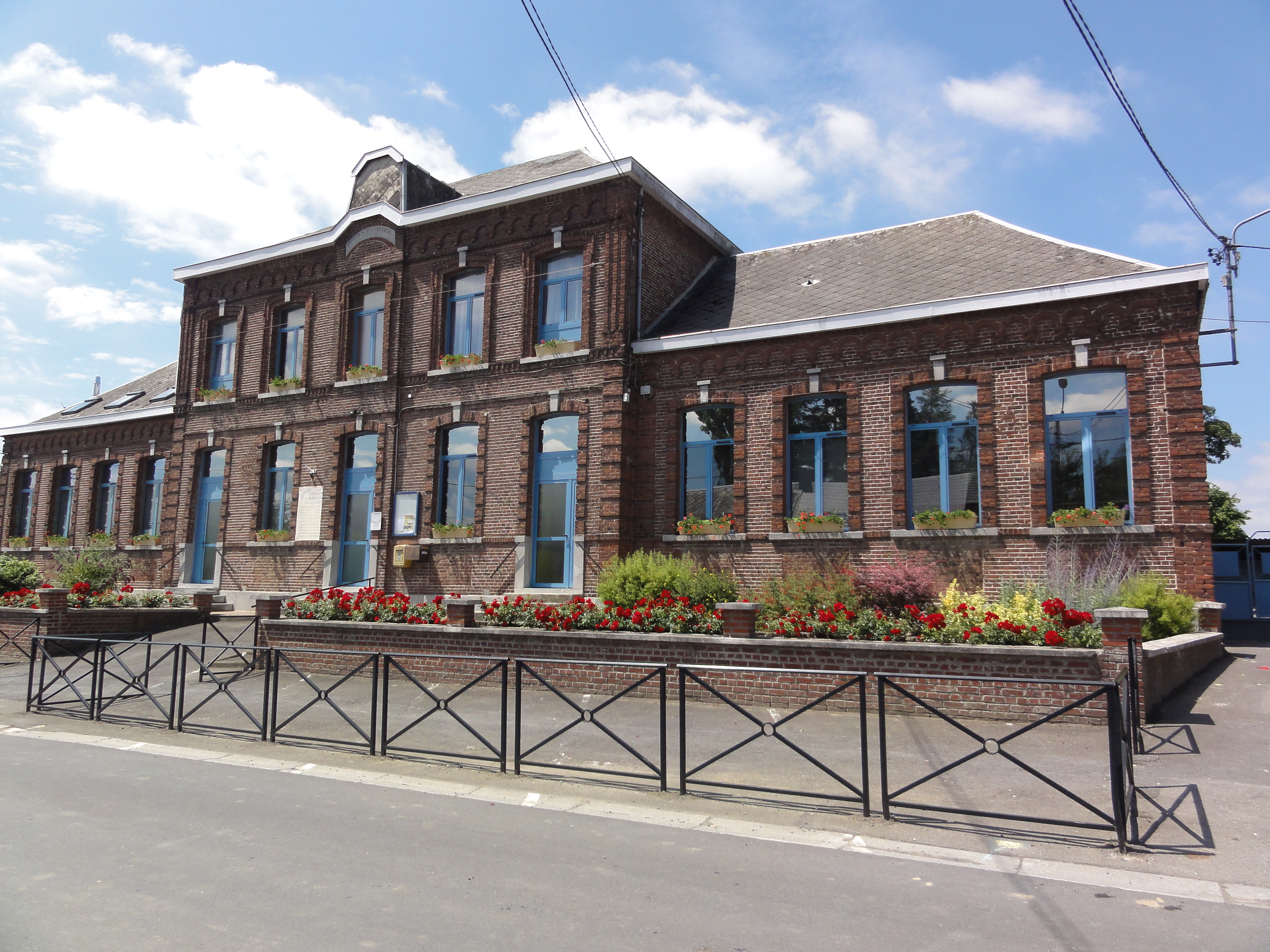 Mairieux (Nord, Fr) mairie-école